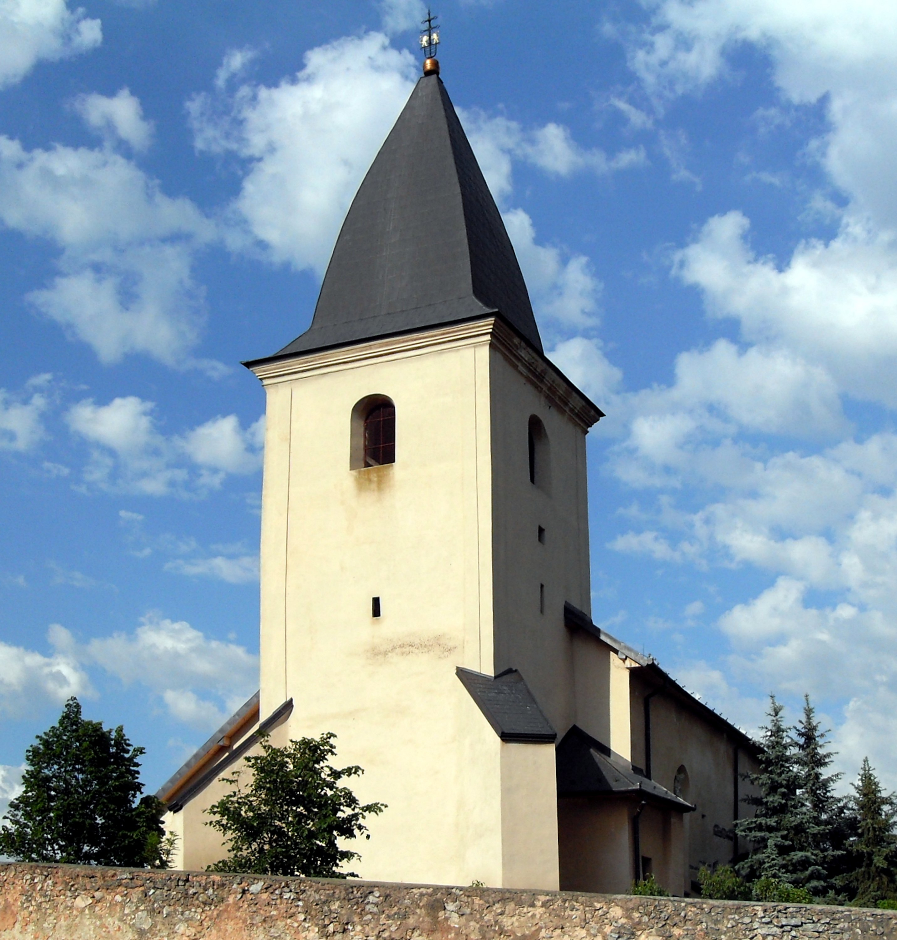 r.k. kostol v Buzice, Turňa nad Bodvou kostol Nanebovzatia Panny Márie.